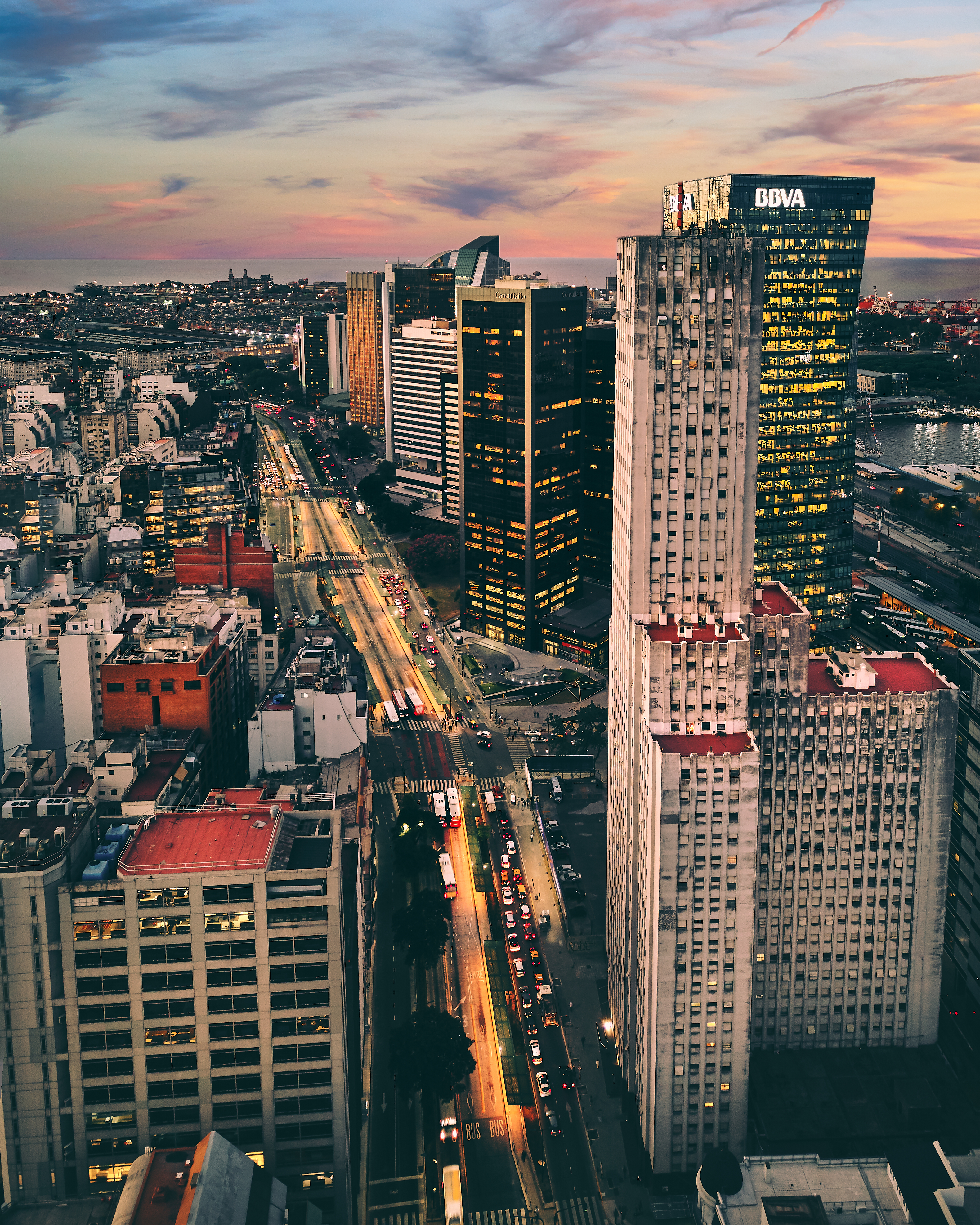 Vista de la Avenida Leandro N. Alem, en Buenos Aires. El Edificio Alas y el complejo Catalinas Norte se ven a la derecha.